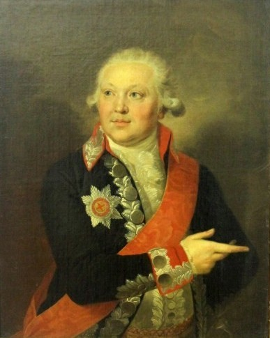 Иван Николаевич Неплюев (1752—1823)